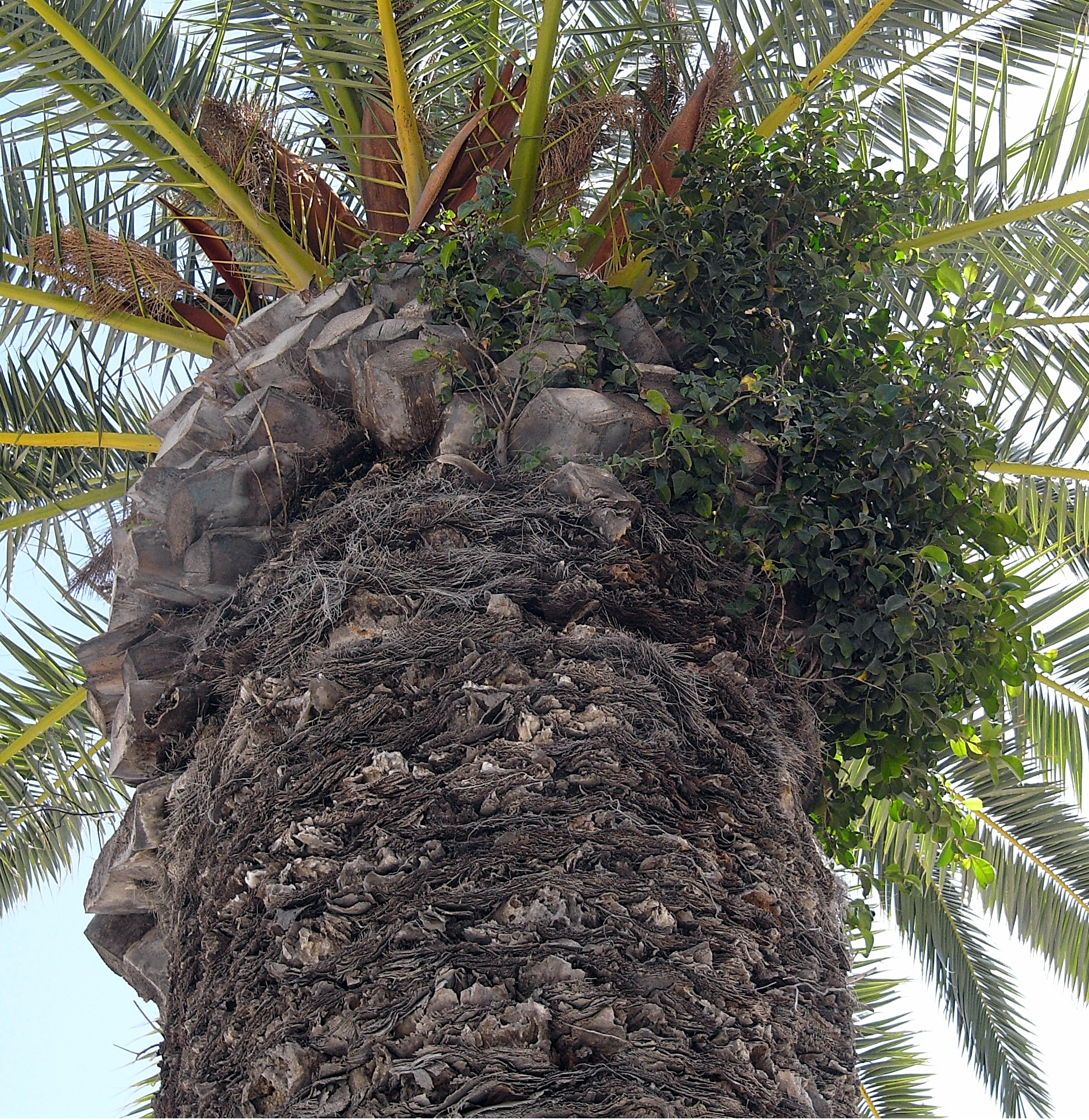 Phoenix canariensis und Ficus microcarpa (epiphytisch) in Sousse, Tunesien, Ende April 2009